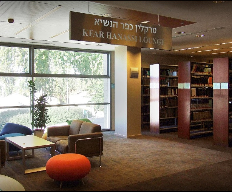 אזור הספות והספרים השמורים